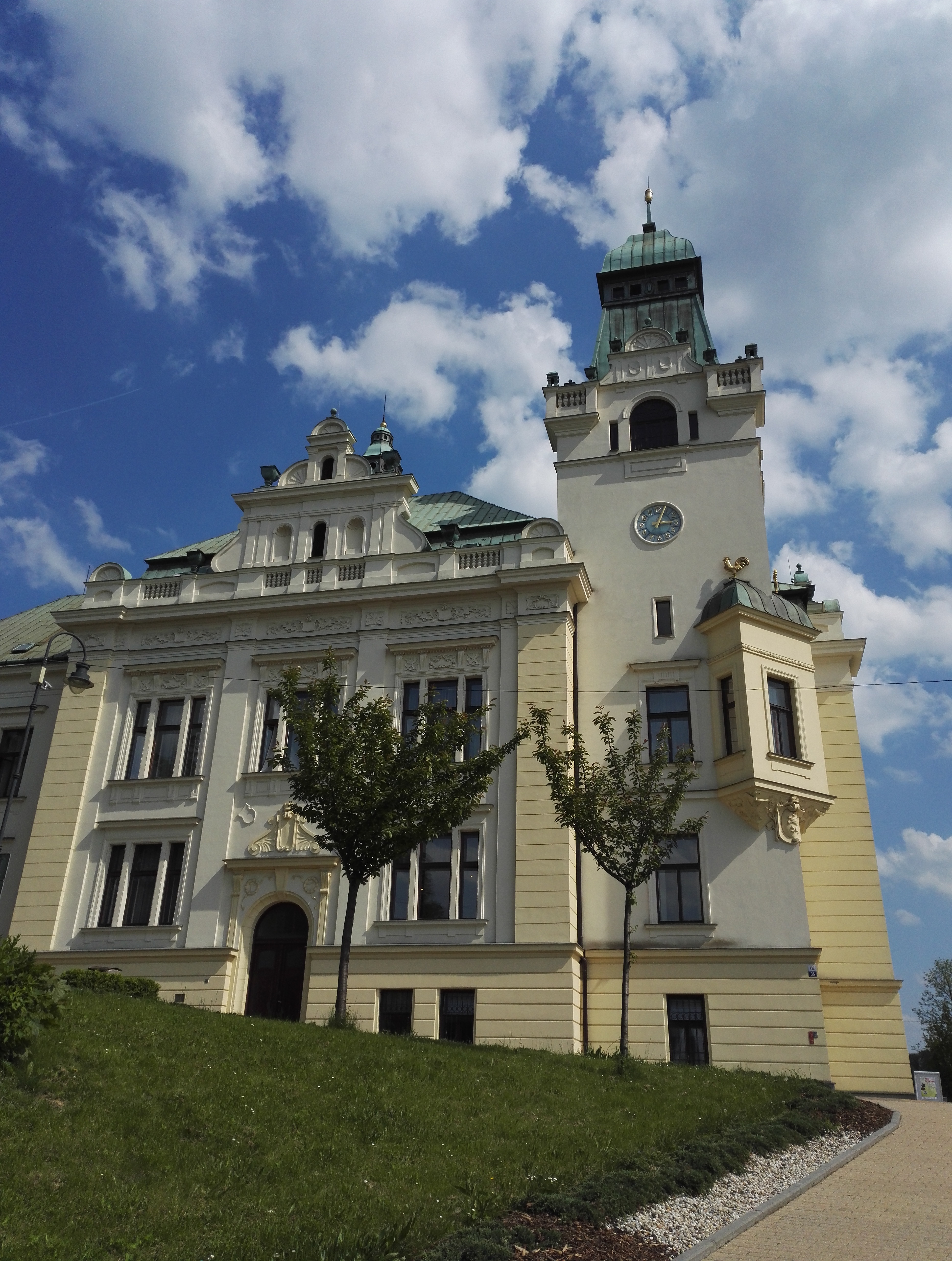 Slezskoostravská radnice